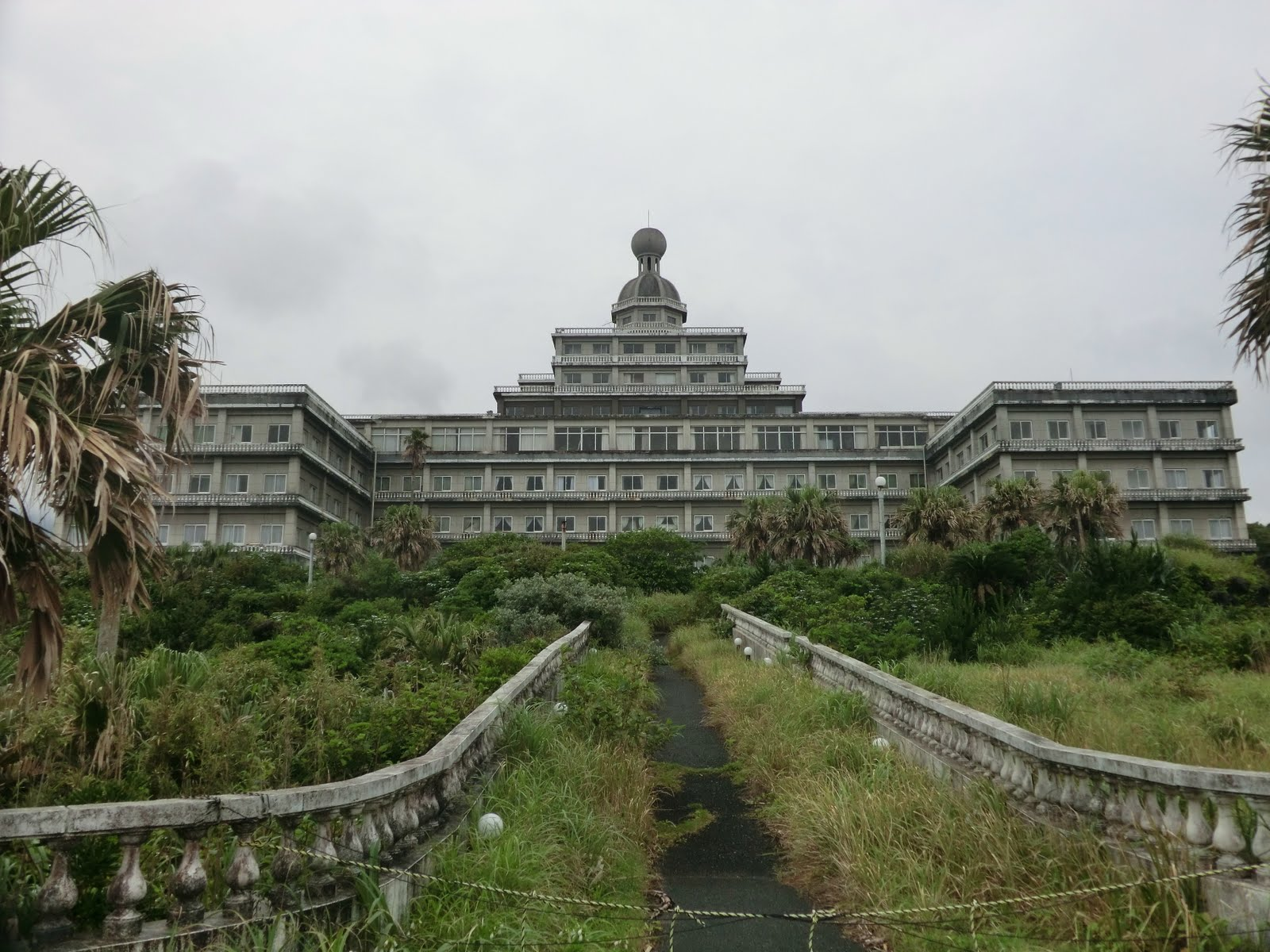 Mitsune, Hachijo, Tokyo 100-1511, Japan